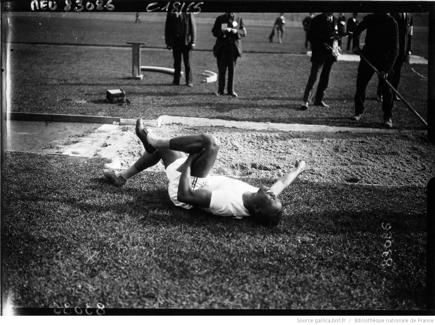 VIIes Olympiades à Anvers : Butler vient de faire un saut malheureux : il comprime un nerf brisé : [photographie de presse] / Agence Meurisse